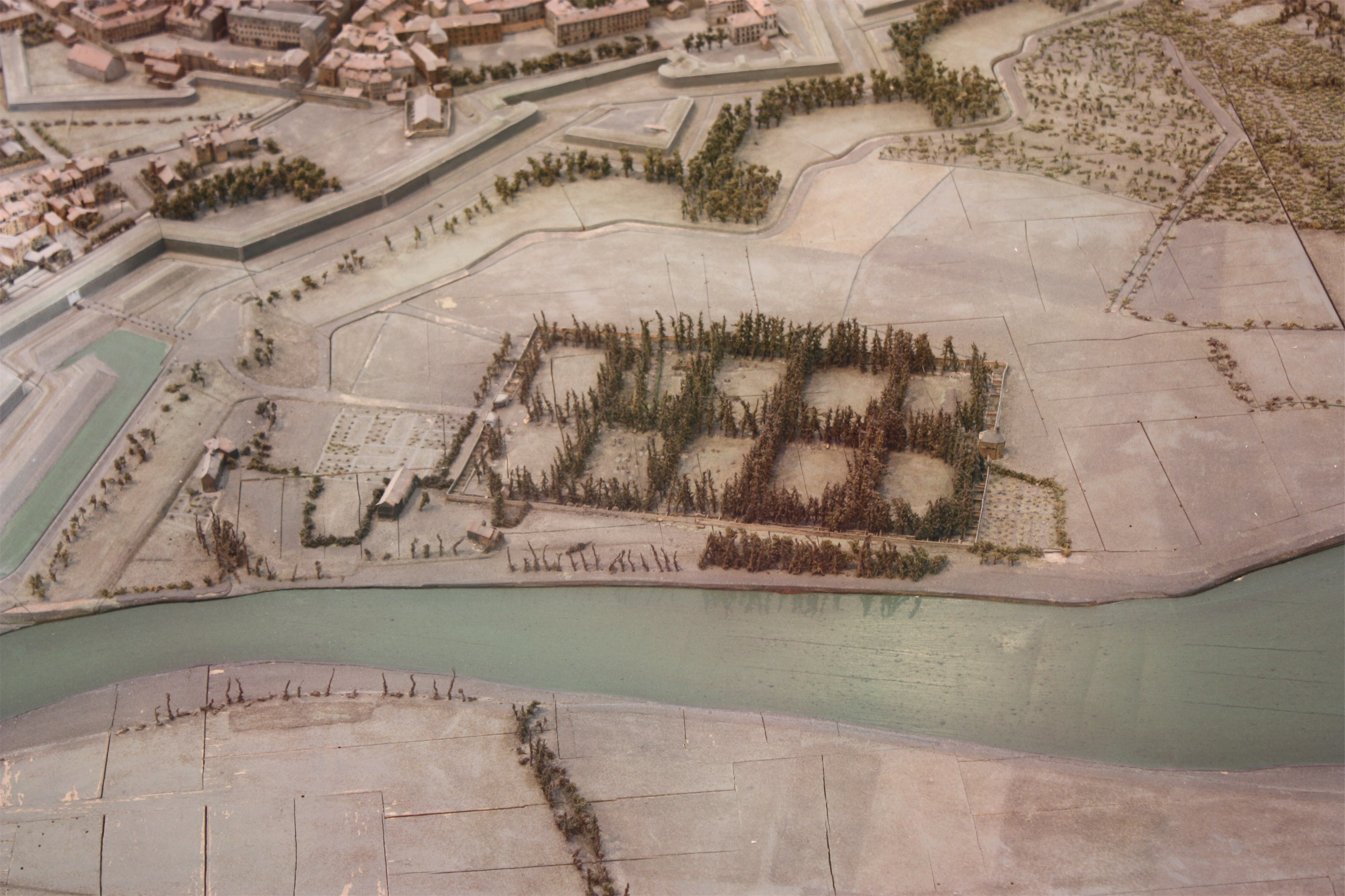 Détail du plan-relief de Grenoble (1848). Zone du cimetière Saint-Roch dans le quartier de l'île Verte.